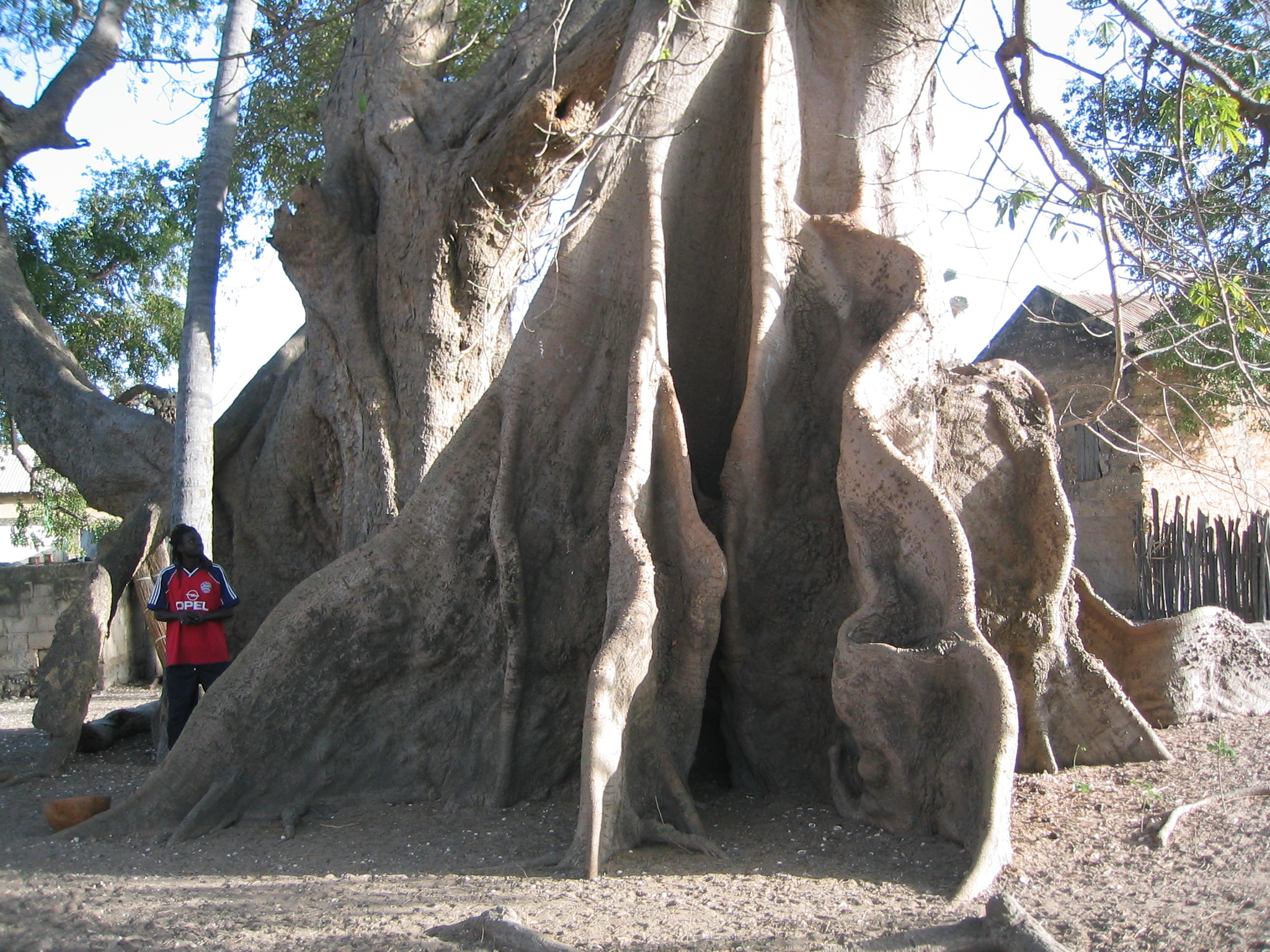 Un fromager (au centre), un rônier et un caïlcedrat entremêlés dans le village Mar Lodj (île du Sénégal). Ils symbolisent l'entente entre les trois religions pratiquées ici : islam, christianisme, animisme